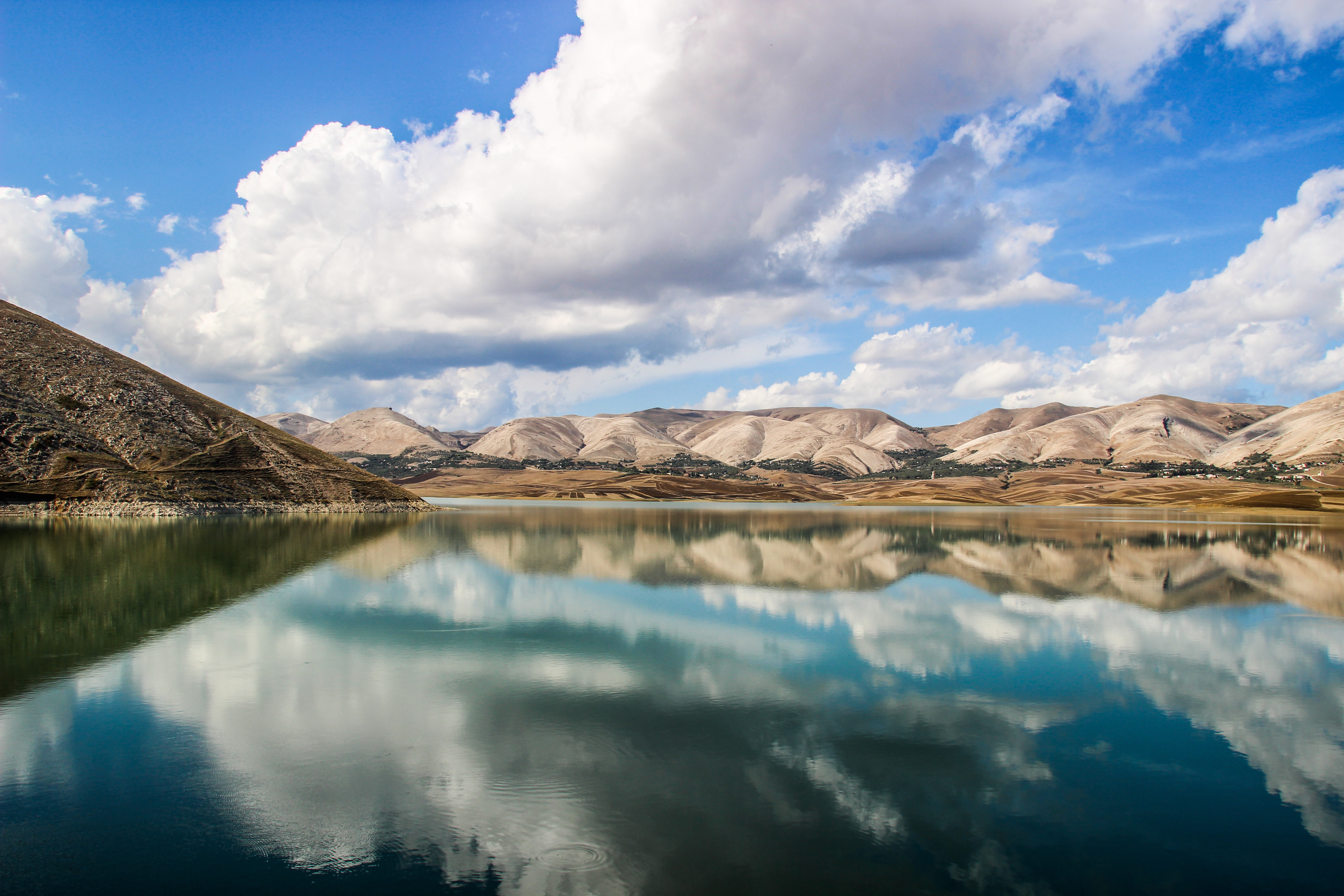 Oued Kasseb - Amdoun Beja - Tunisie